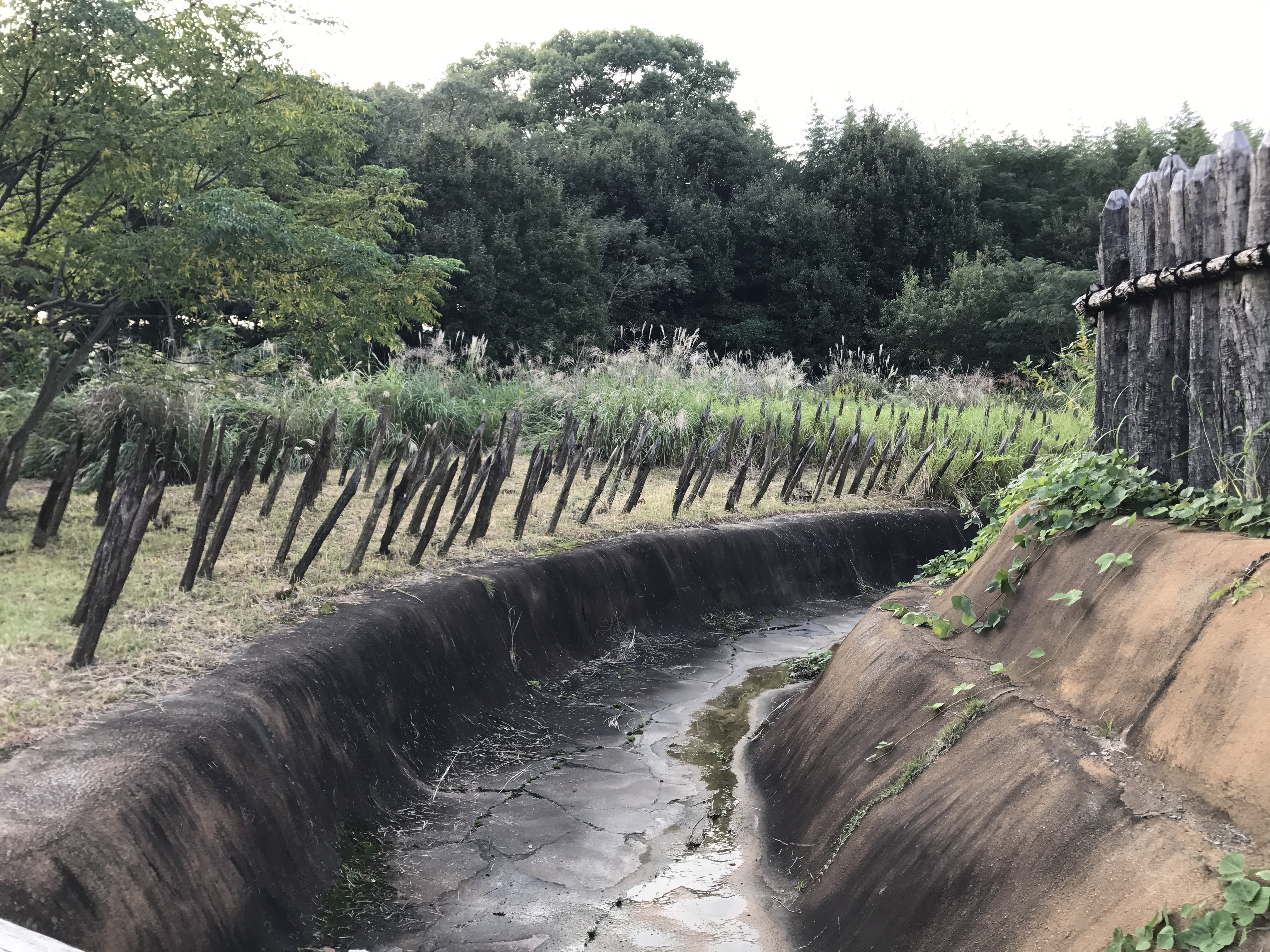 吉野ヶ里歴史公園・環濠入口広場付近の逆茂木